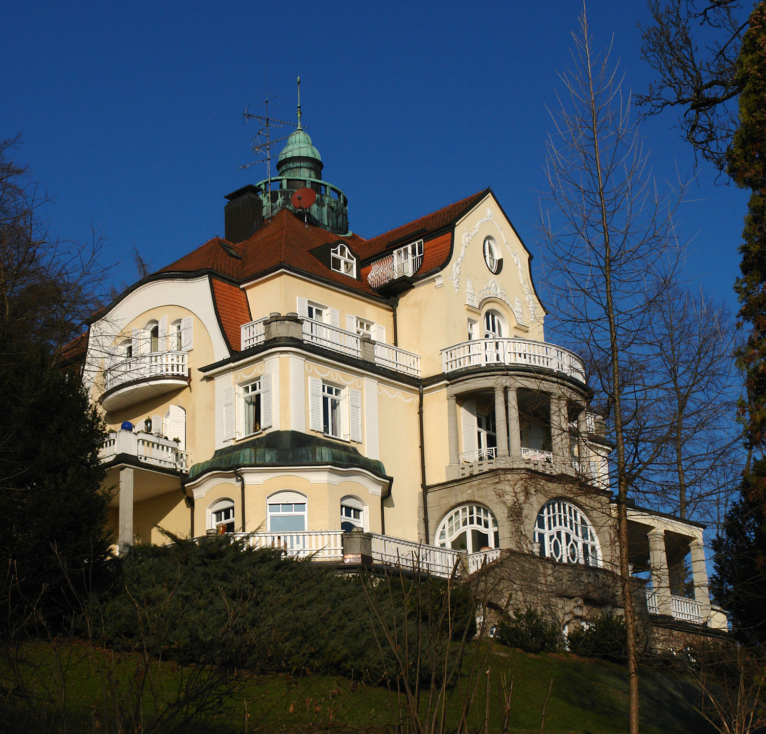 Feldafing: Villa oberhalb der Thurn-und-Taxis-Straße: Villa Sigmund Bergmann, sog. Parkvilla, Höhenbergstraße 15